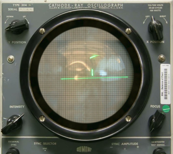 Tennis For Two come appariva nel 1958